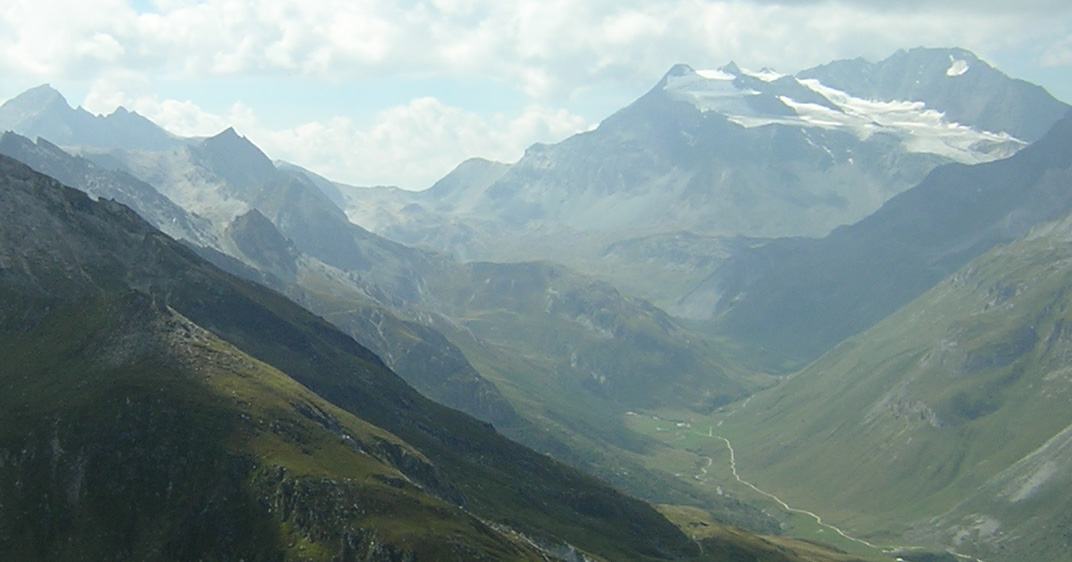 Photo prise par moi-même Col de chavière dans le fond, à la gauche du glacier de Peclet-Polset